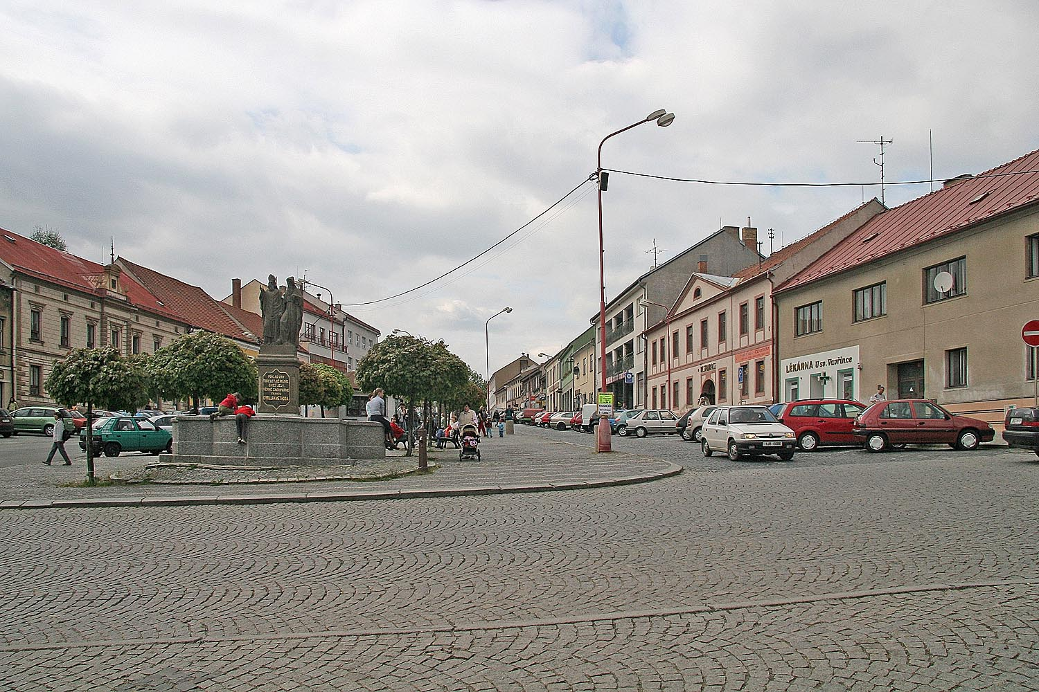 Bystřice nad Pernštejnem - náměstí, district Žďár nad Sázavou